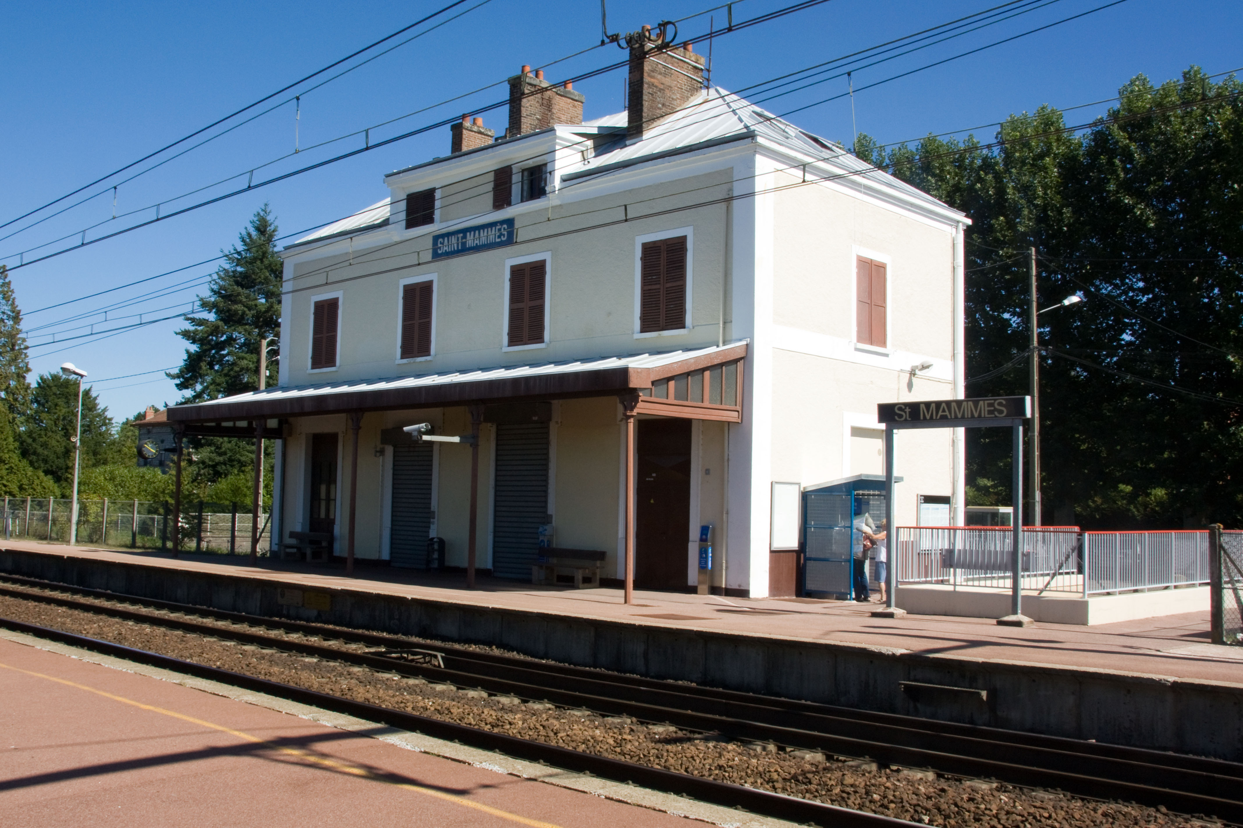 Gare de Saint-Mammès, Saint-Mammès, Seine-et-Marne, France